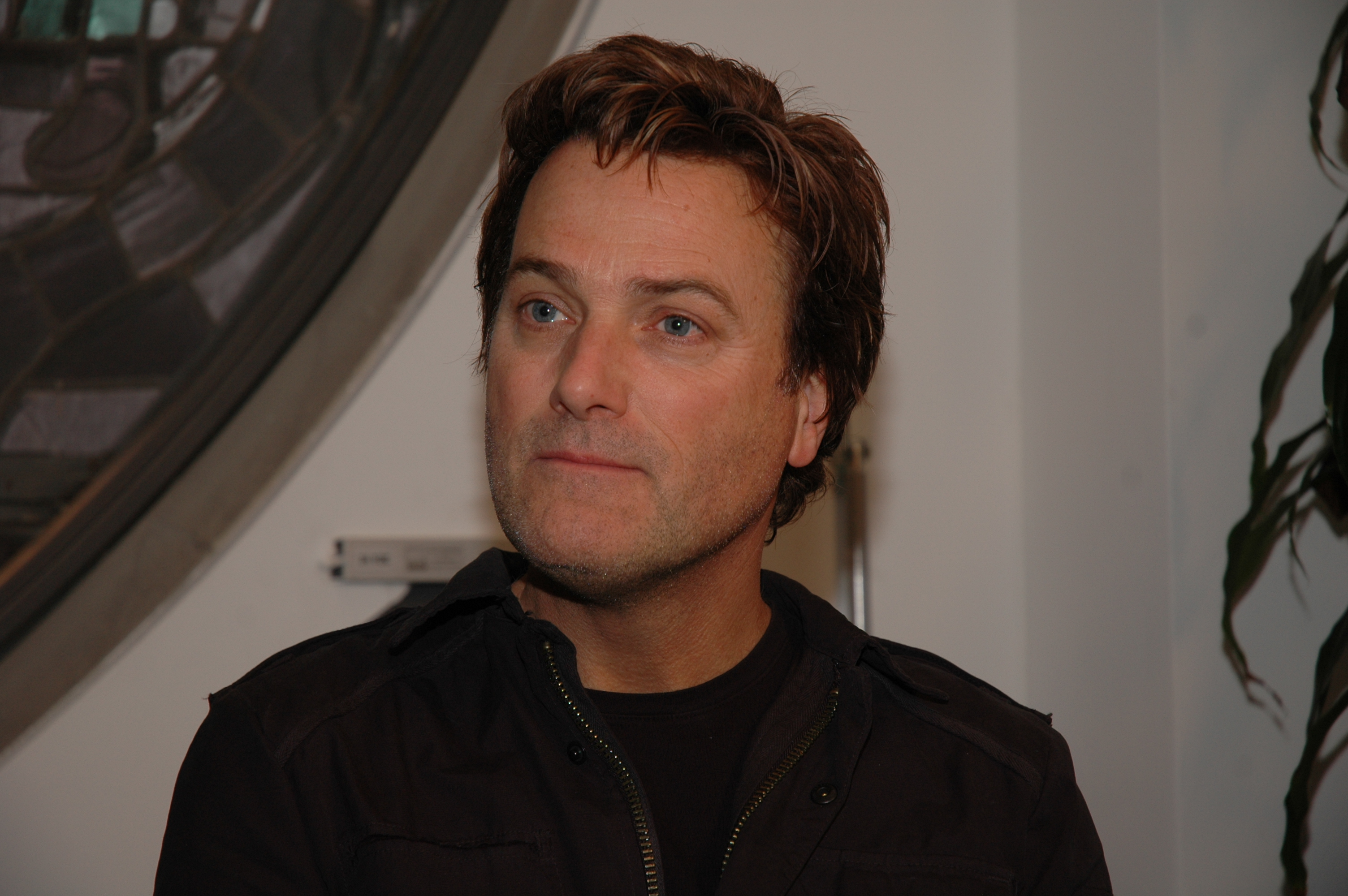 Der Sänger Michael W. Smith bei einem Interview mit dem Christlichen Medienmagazin pro am 2.3.2009 in Frankfurt am Main